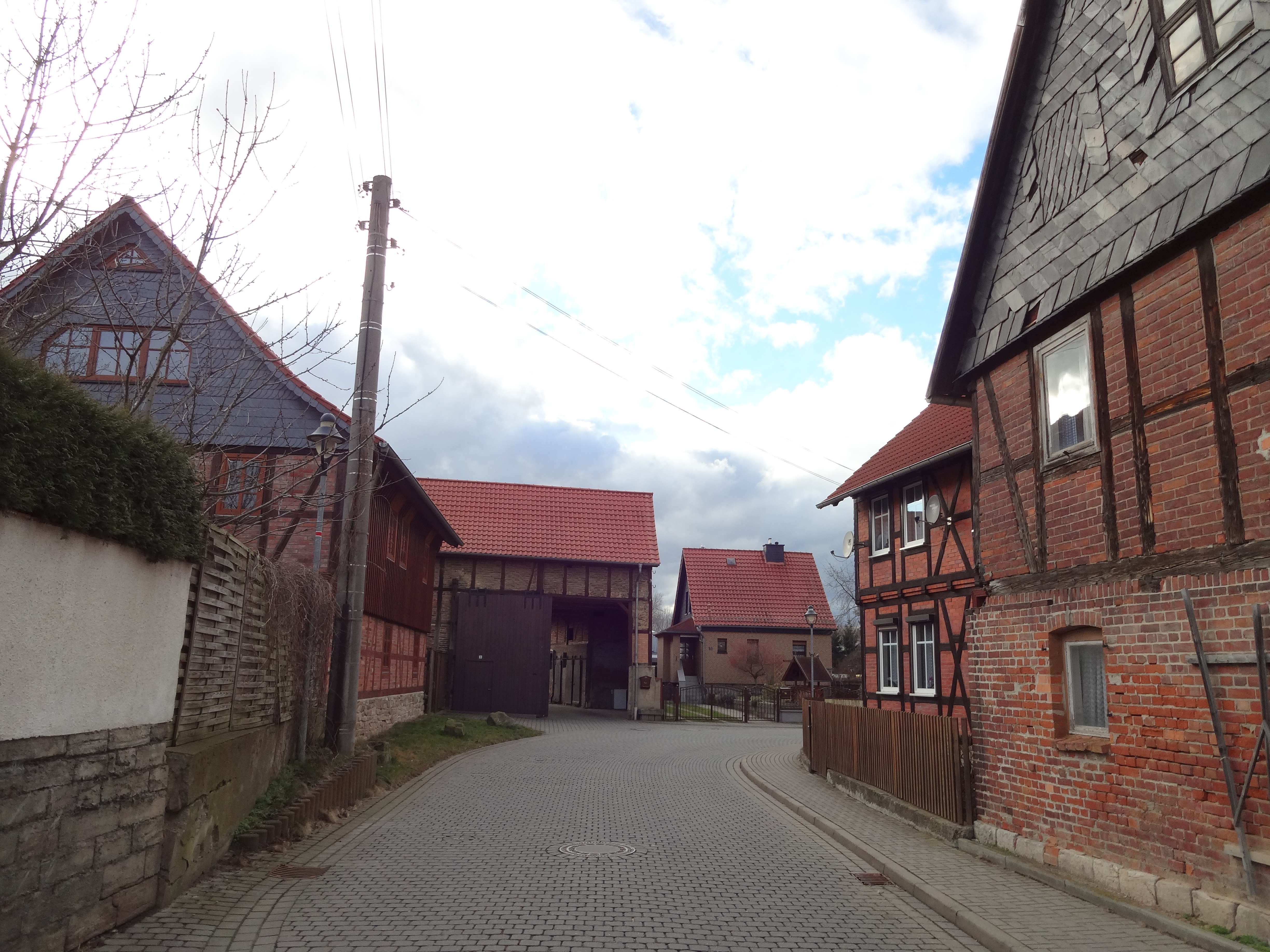 Denkmalgeschütztes Bauernhaus in der Glockengasse 6 und ehemals geschütztes Bauernhaus in der Glockengasse 11 und 12 in Silstedt, Ortsteil von Wernigerode